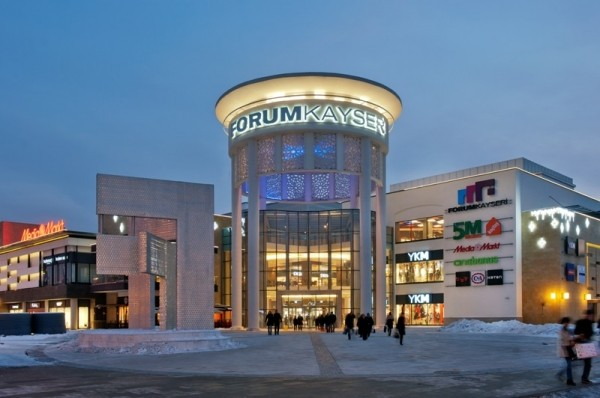 kayserinin en büyük alışveriş merkezi kayseri forum